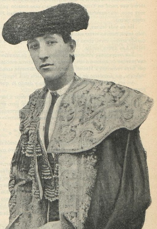 Manuel Jiménez, Chicuelo. "La Fiesta Nacional" (Barcelona), 5 de diciembre de 1907